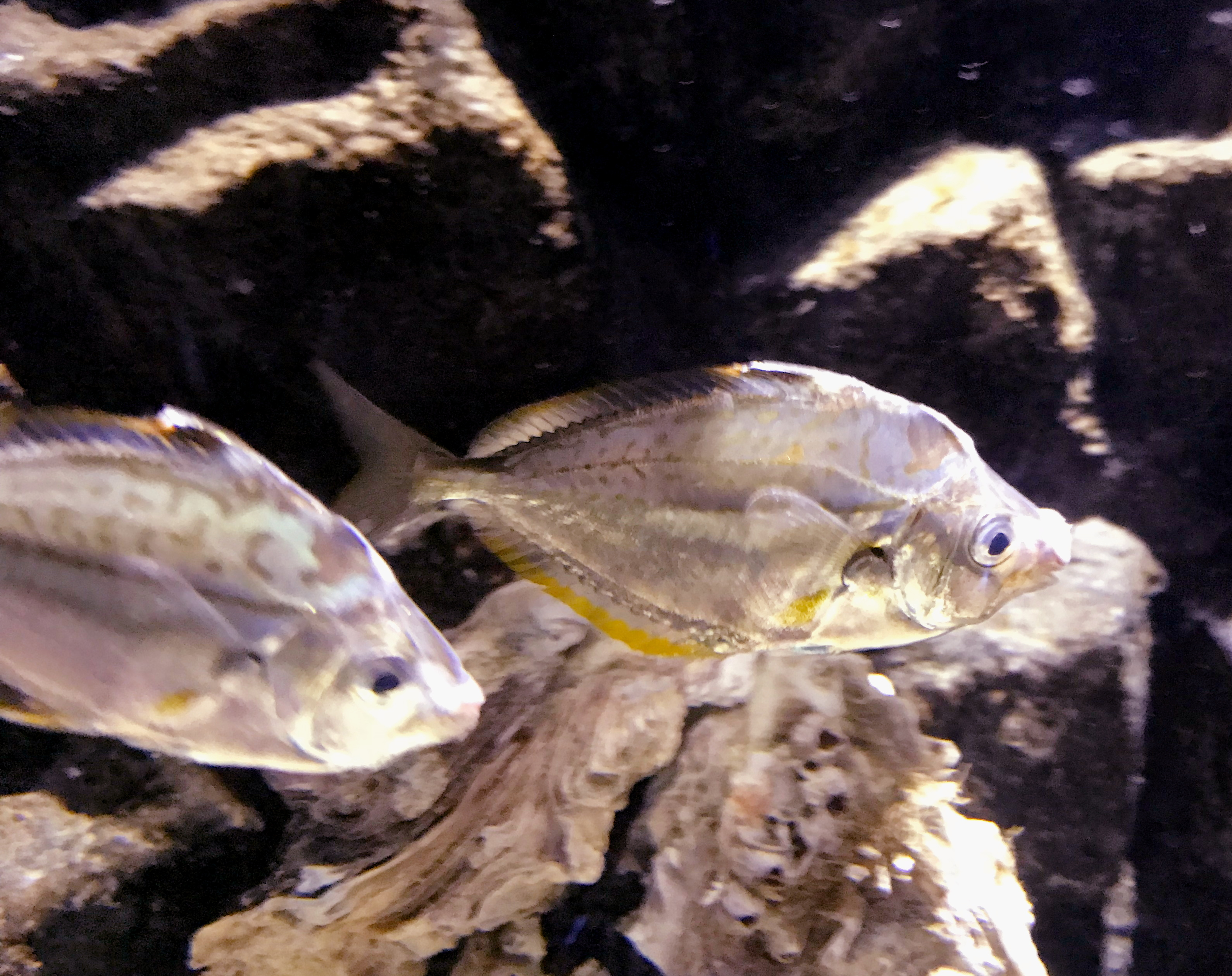 ヒイラギ Nuchequula nuchalis 上越市立水族博物館の飼育個体。